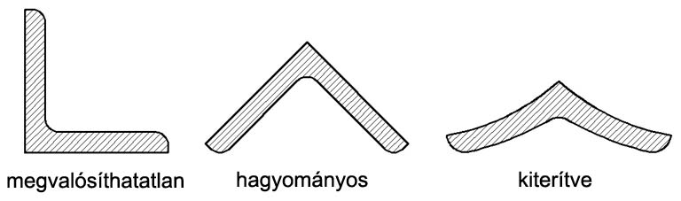 Példa szögacél elhelyezésére